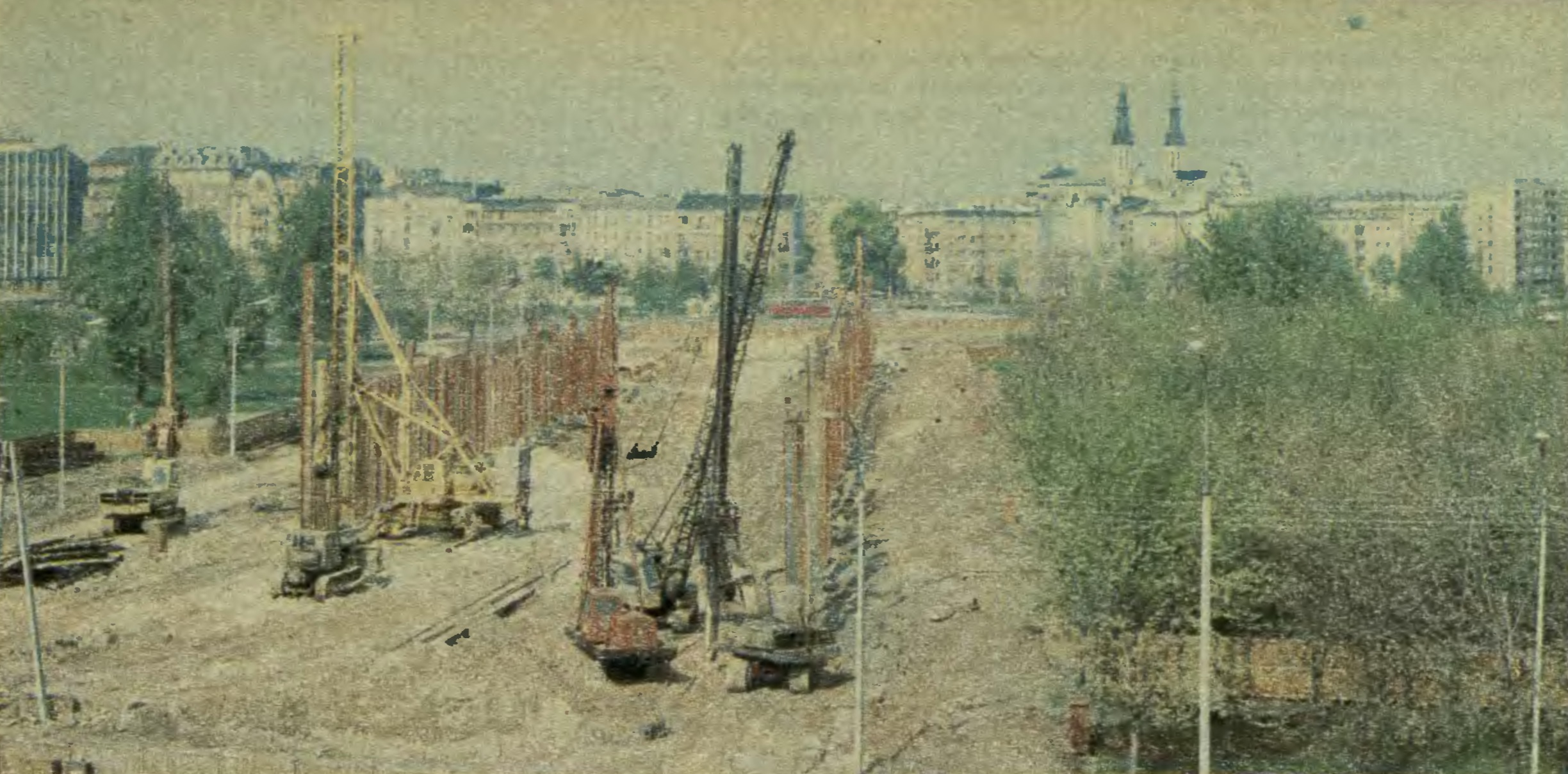 Budowa torów odstawczych zlokalizowanych na południe od stacji metra A11 Politechnika, czerwiec 1985.